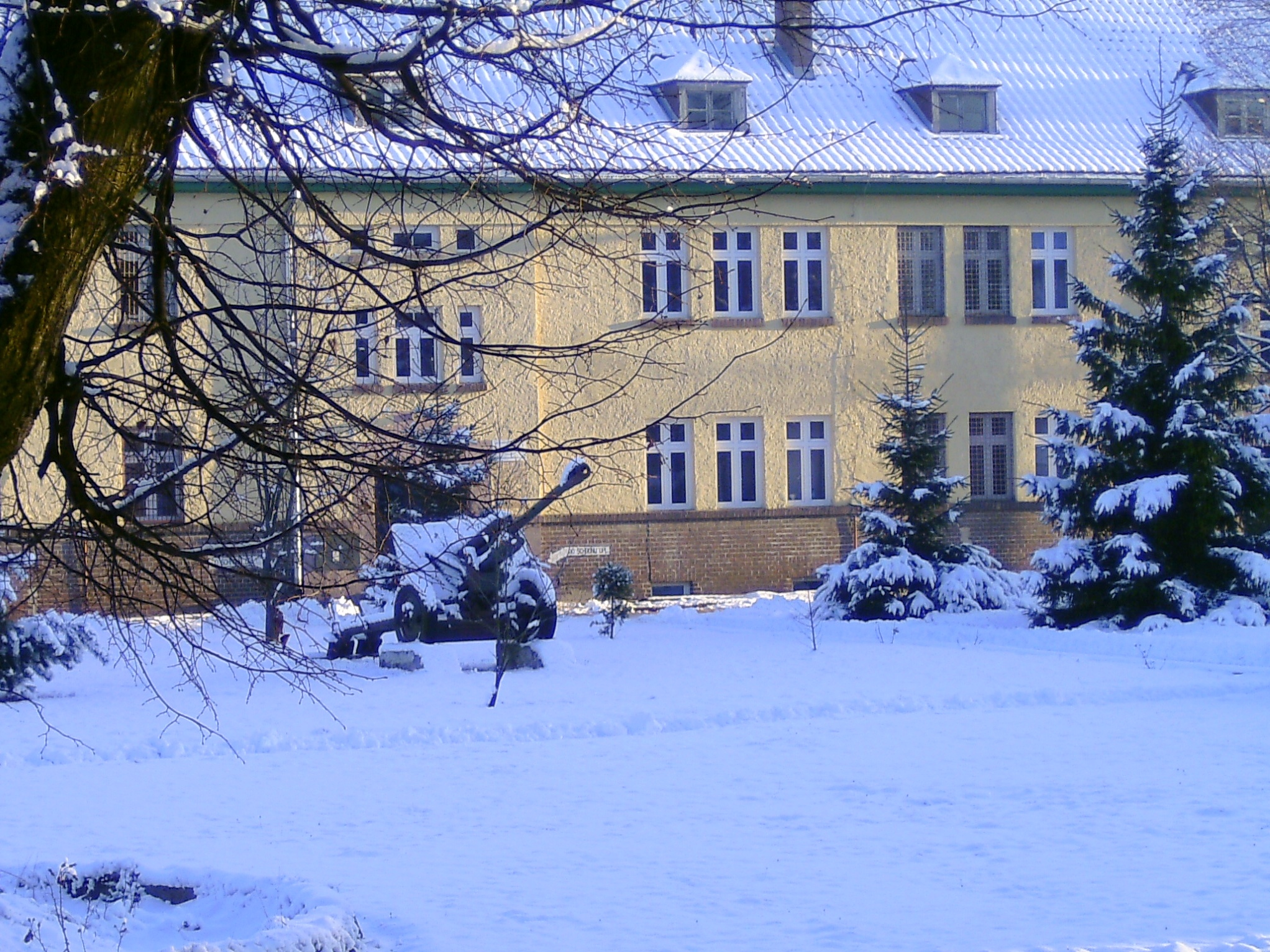 Koszary w Orzyszu - dywizjon artylerii